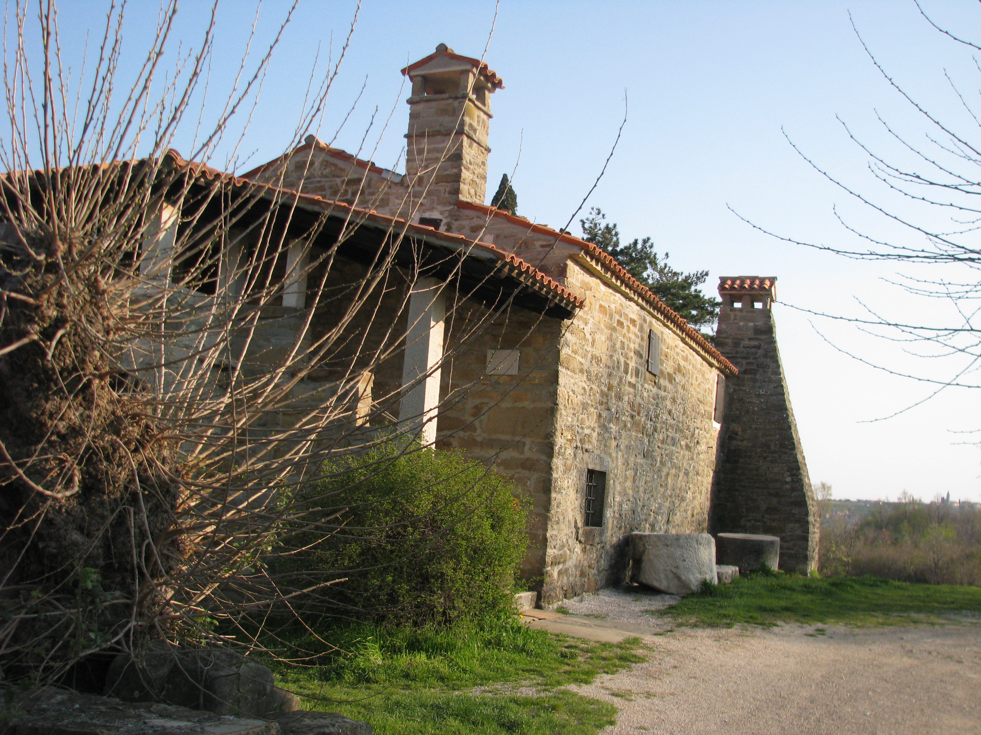 Tonina hiša, torklja, Sveti Peter, near Piran, Slovenija